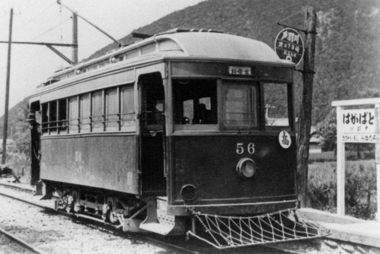 高富線でのDD56